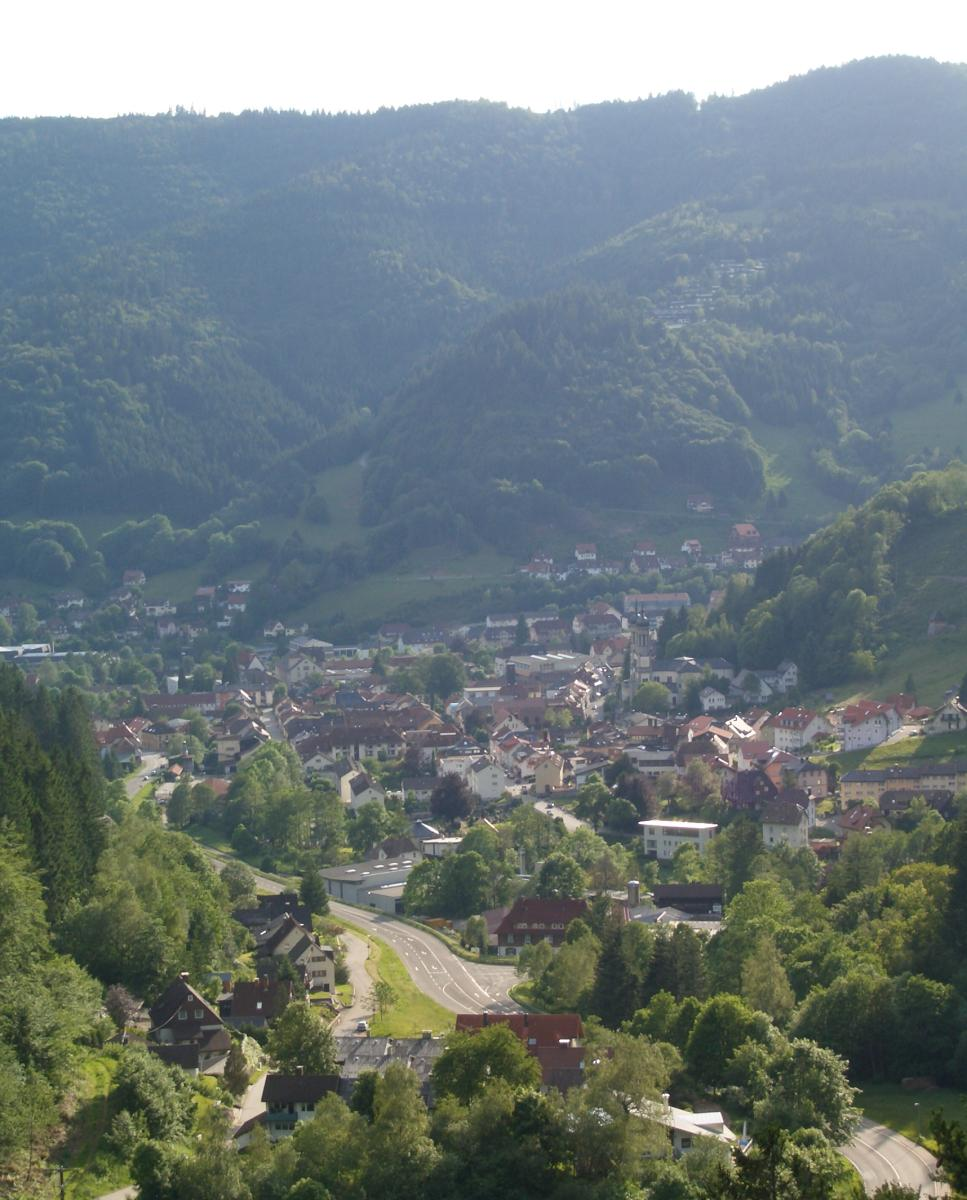 Blick auf Todtnau